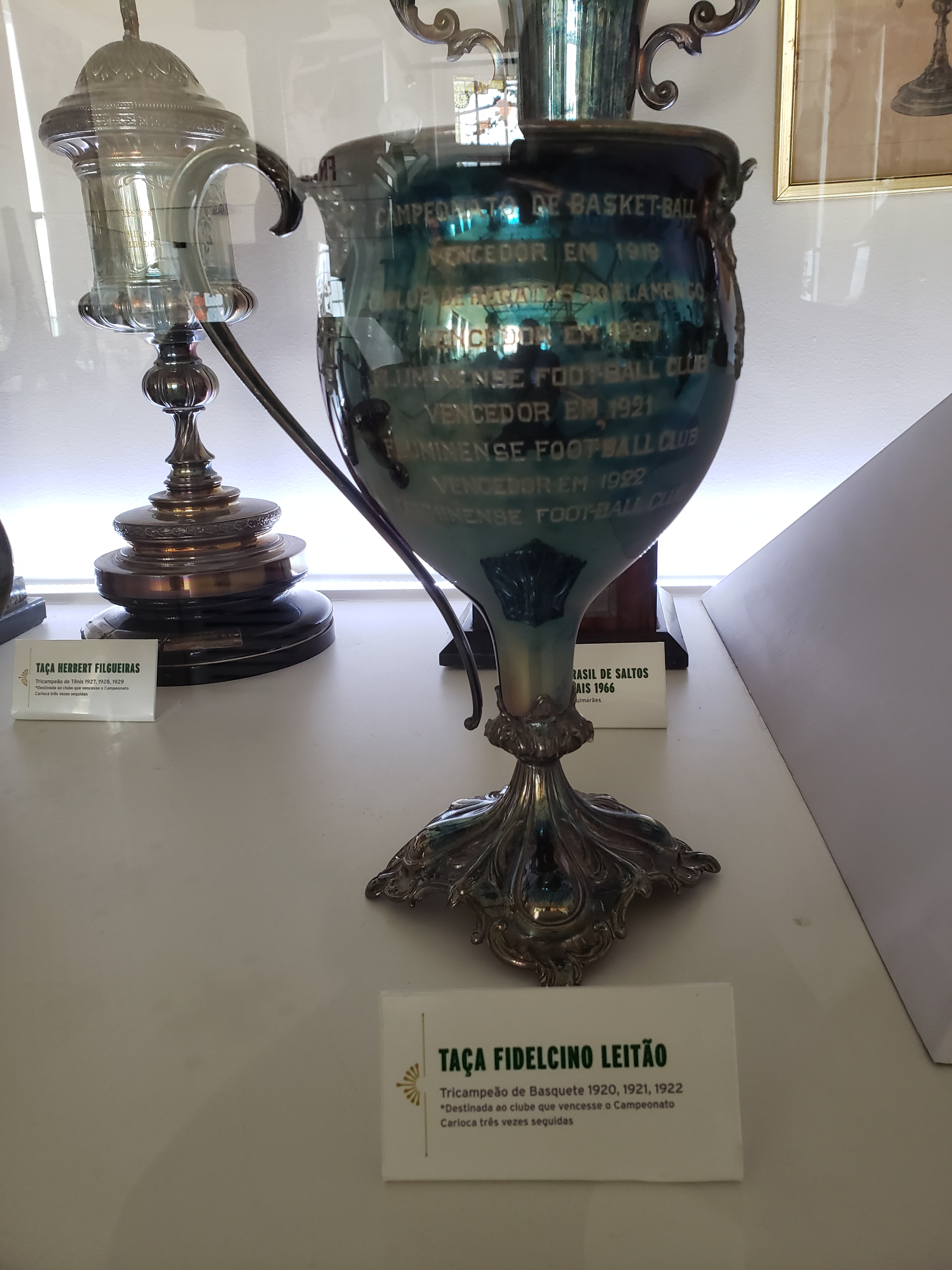 Taça Fidelcino Leitão, destinada ao clube que vencesse o Campeonato Carioca de Basquete por três anos consecutivos (1920-21-22), conquistada pelo Fluminense Football Club.